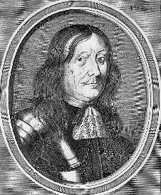 Bildnis des Johann von Sporck (um 1600-1679), Generalfeldmarschall und Reichsgraf